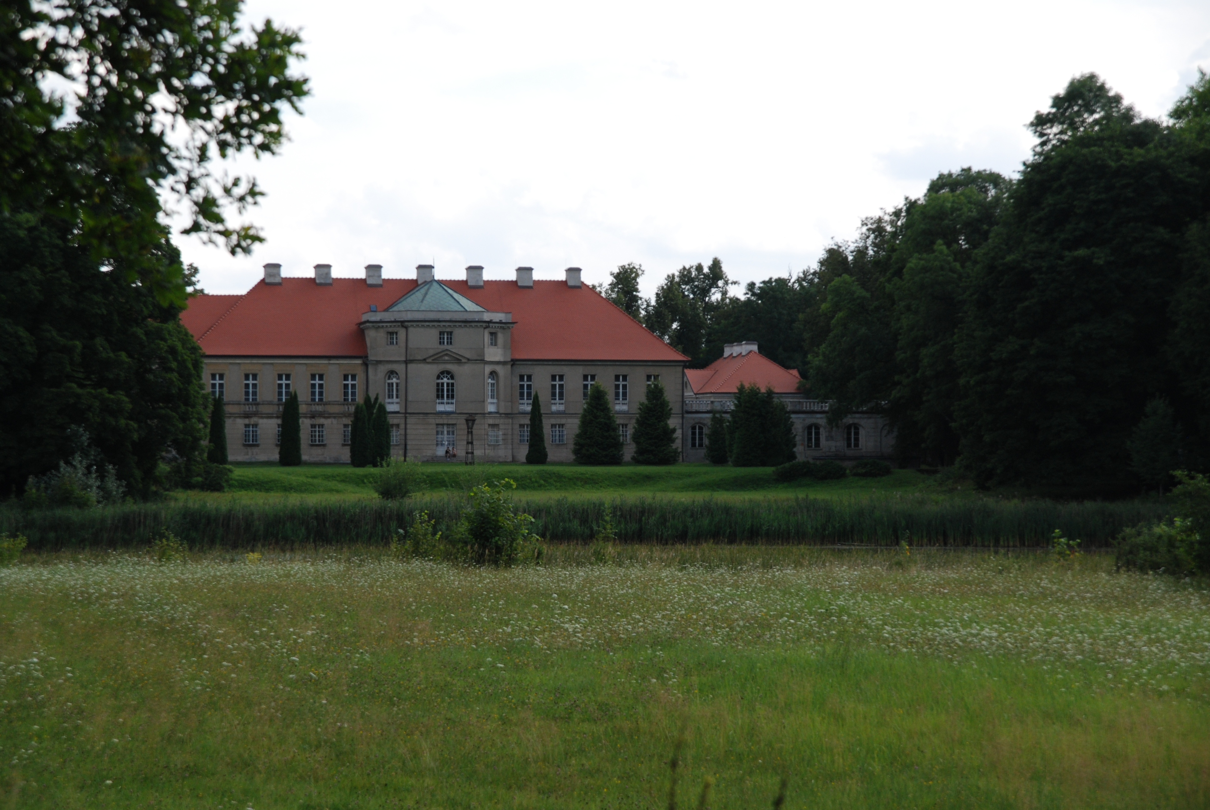 Czerniejewo, pałac, 1771-1775, 1926-1928